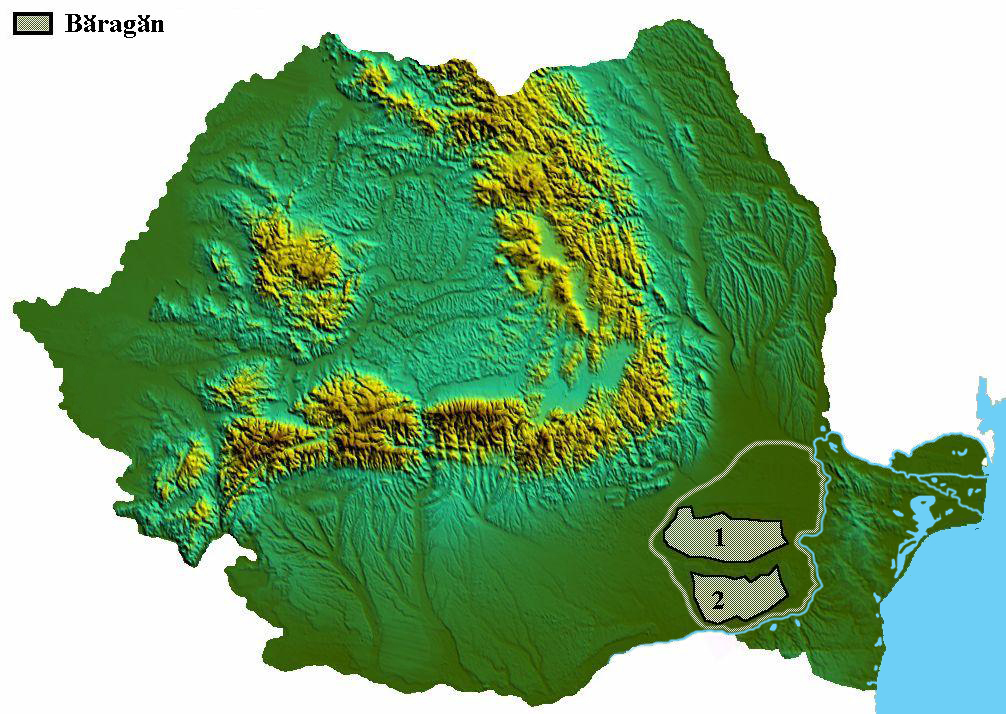 Baragan